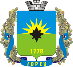 Герб м. ТОРЕЗА